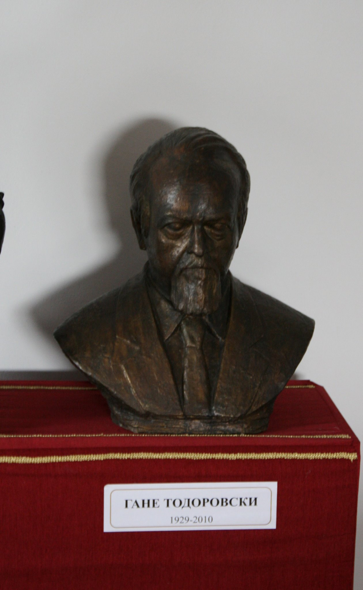 Gane Todorovski -- Struga